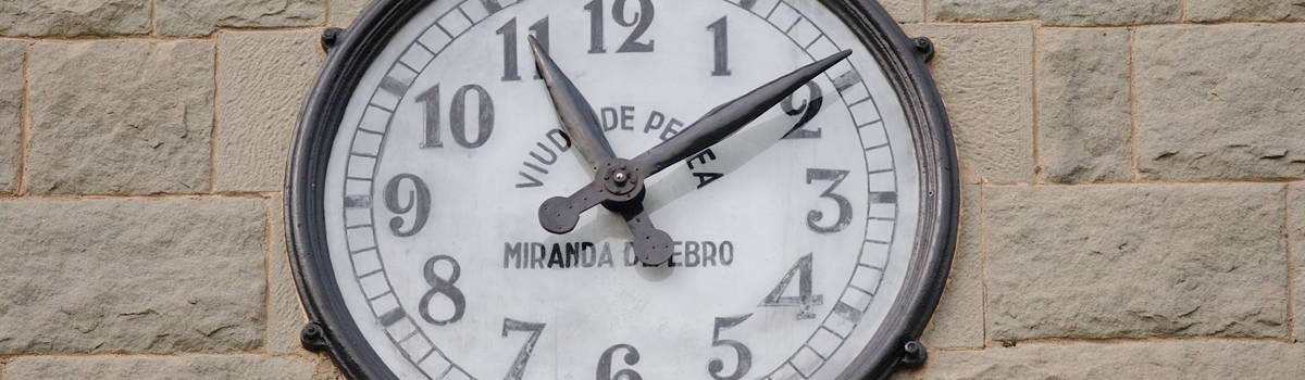 Rellotge de la façana de l'ajuntament de Parets, obra de la fundición Viuda de Ángel Perea de Miranda de Ebro.